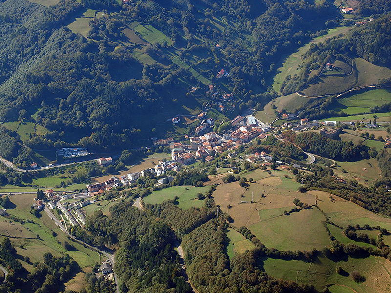 Vista aérea de la villa de Pola de Allande, Asturias.